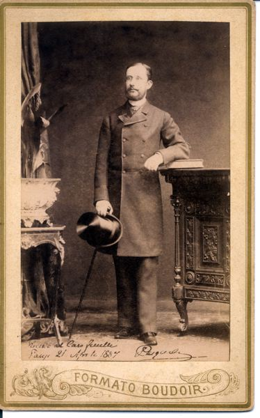 Pasquale, Conte di Bari